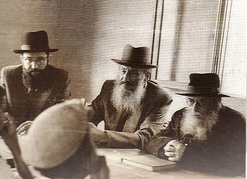 החזון איש בוחן בחורים בזכרון מאיר יחד עם רבי שמואל רוזובסקי, במרכז יושב יעקב הלפרין